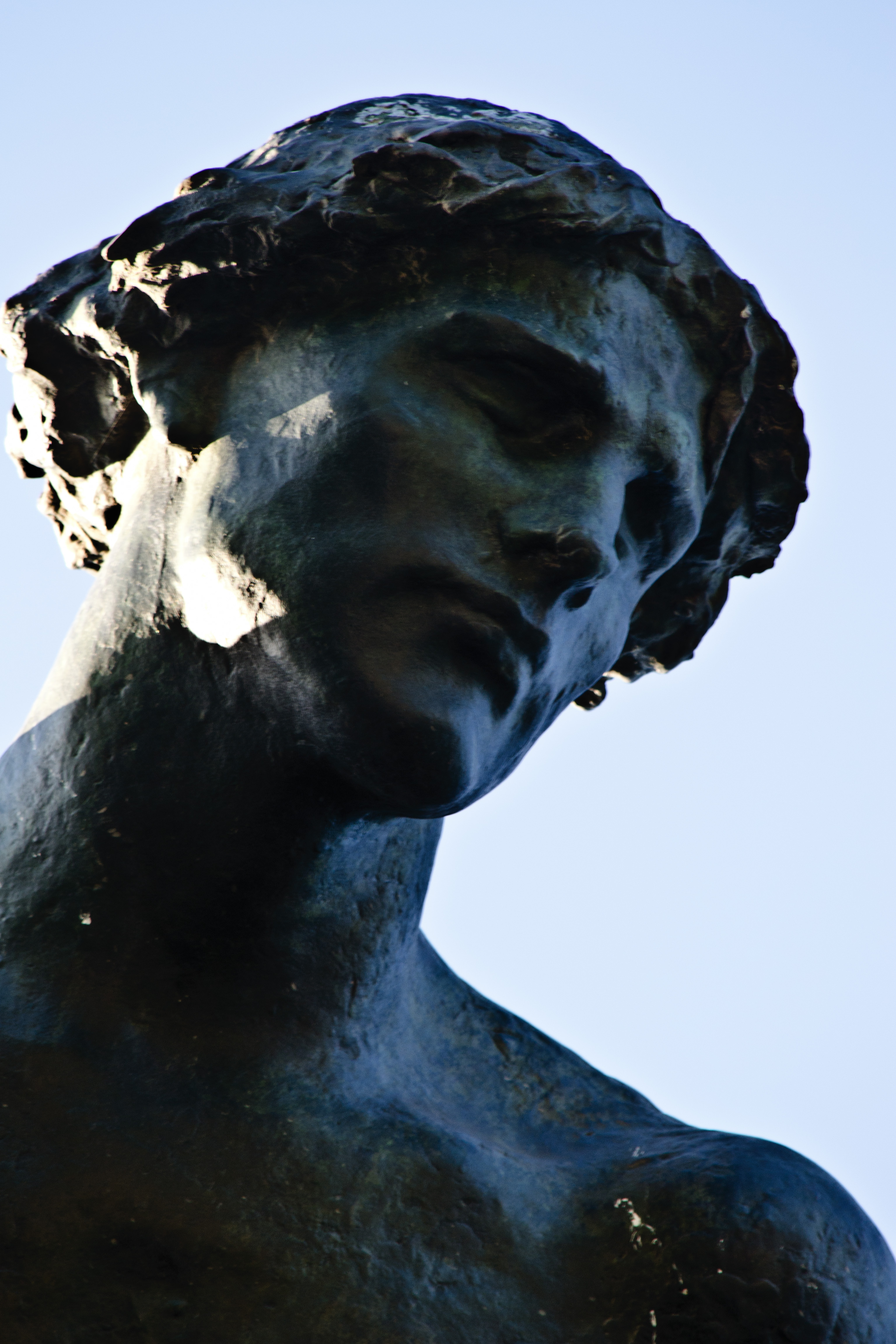 Estatua ecuestre de Sant Jordi (San Jorge) realizada en bronce por el escultor Josep Llimona entre 1918 y 1924. Está situada en el Mirador del Llobregat del Parque de Montjuic.